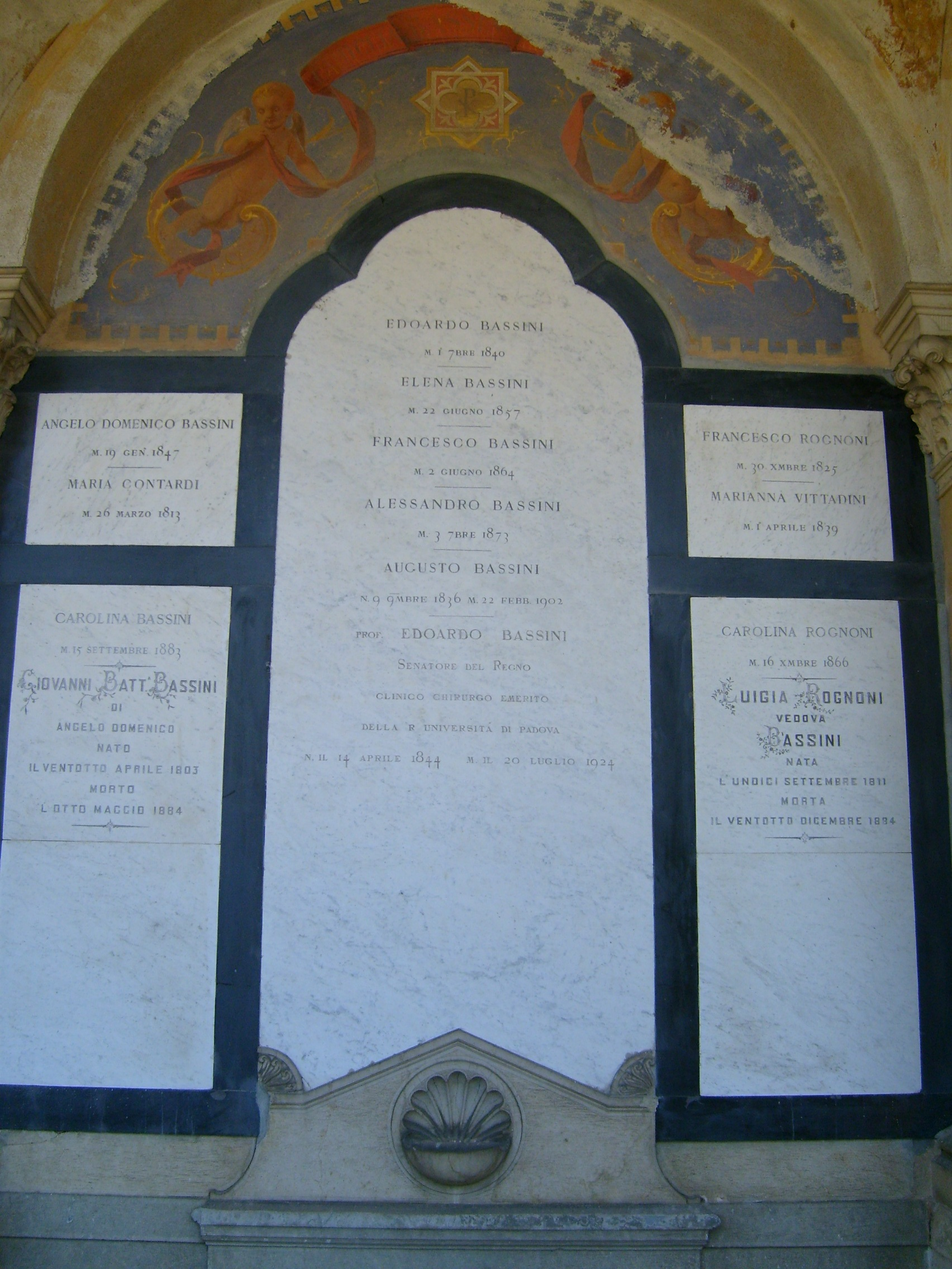 Edoardo Bassini's tomb, Cimitero Monumentale, Pavia, Italy